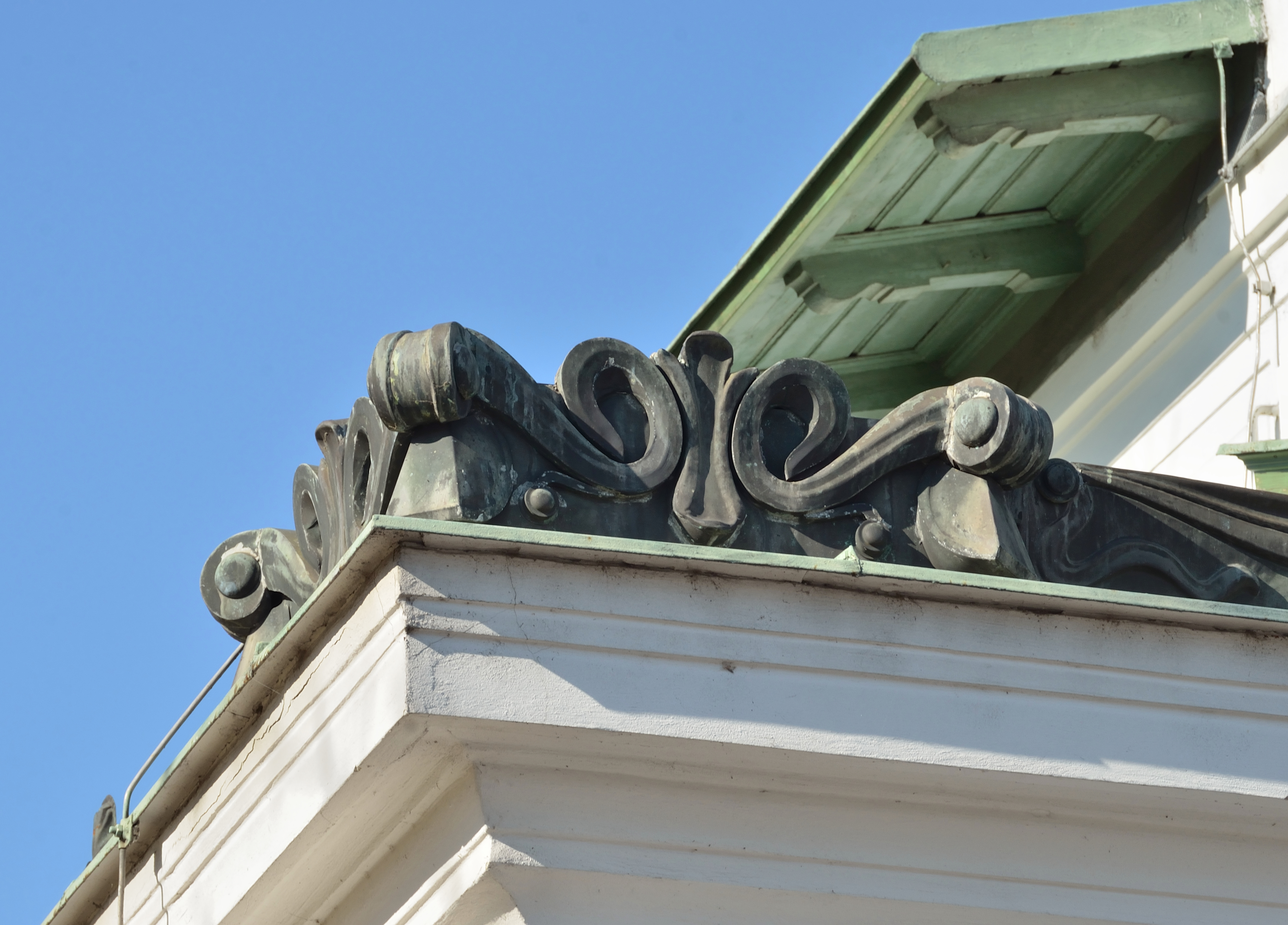 Das Stationsgebäude Schönbrunn der ehem. Stadtbahn – Teilbereich der heutigen U4. Detailansicht des Daches.